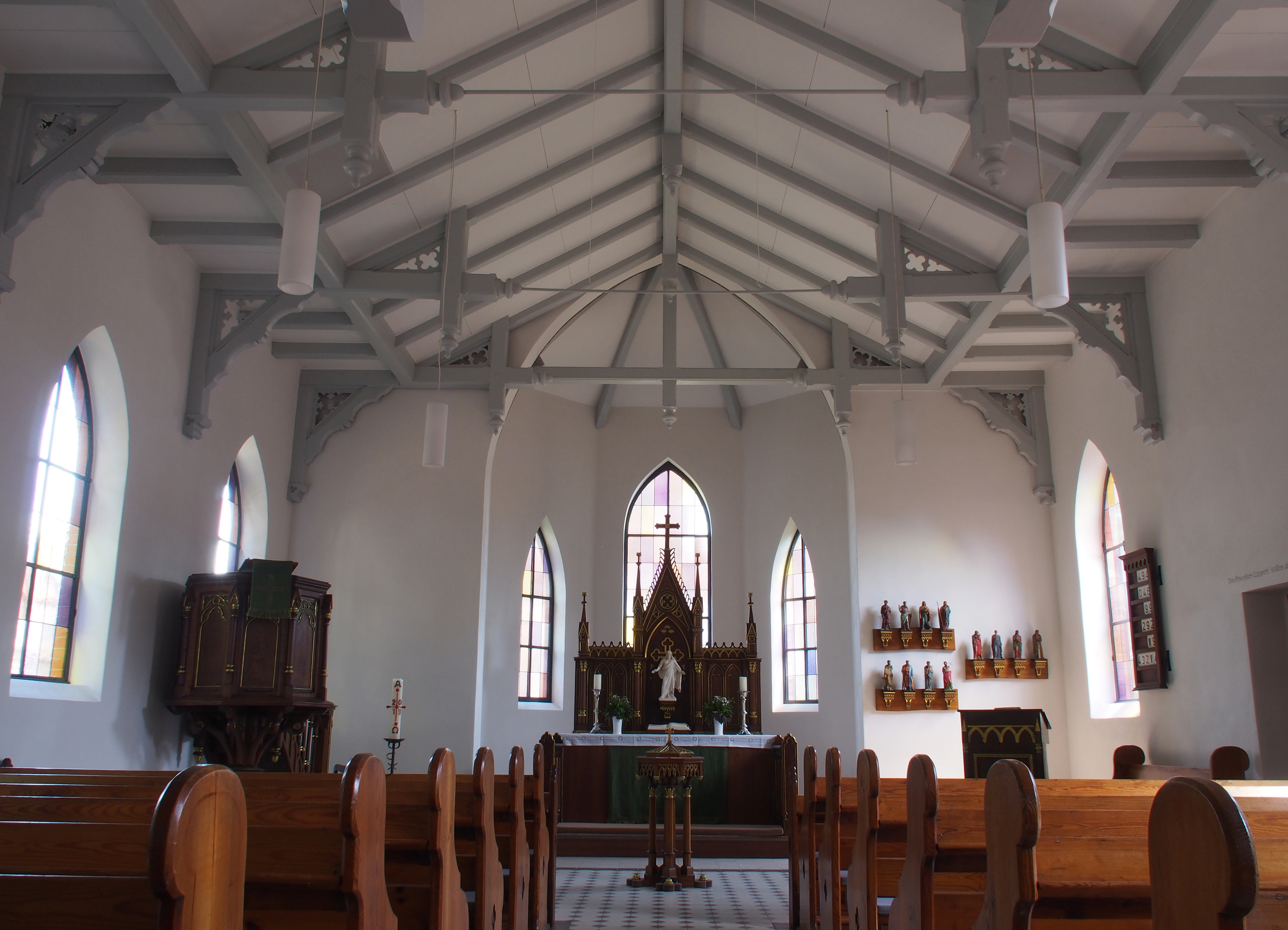 Innenraum mit Altar der Kleinen Kreuzkirche in Hermannsburg, Niedersachsen, Germany